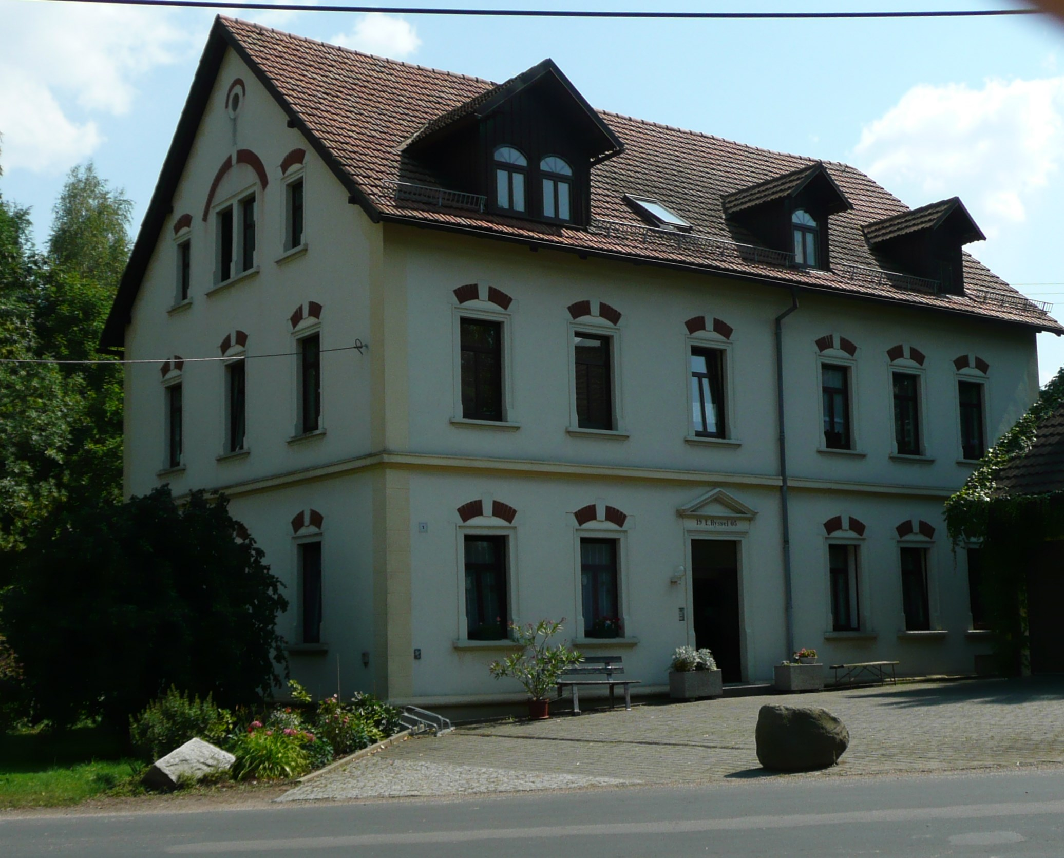 ehemaliges Gasthaus bei der Station Niederdittmannsdorf der ehemaligen Kleinbahn Wilsdruff-Nossen